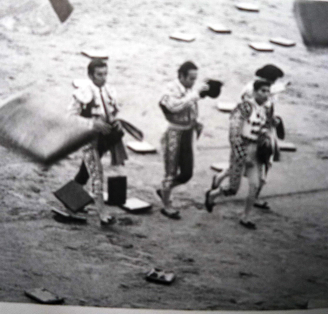 Romero_sortiecoussins.JPG/C.Romero sortie sous coussins